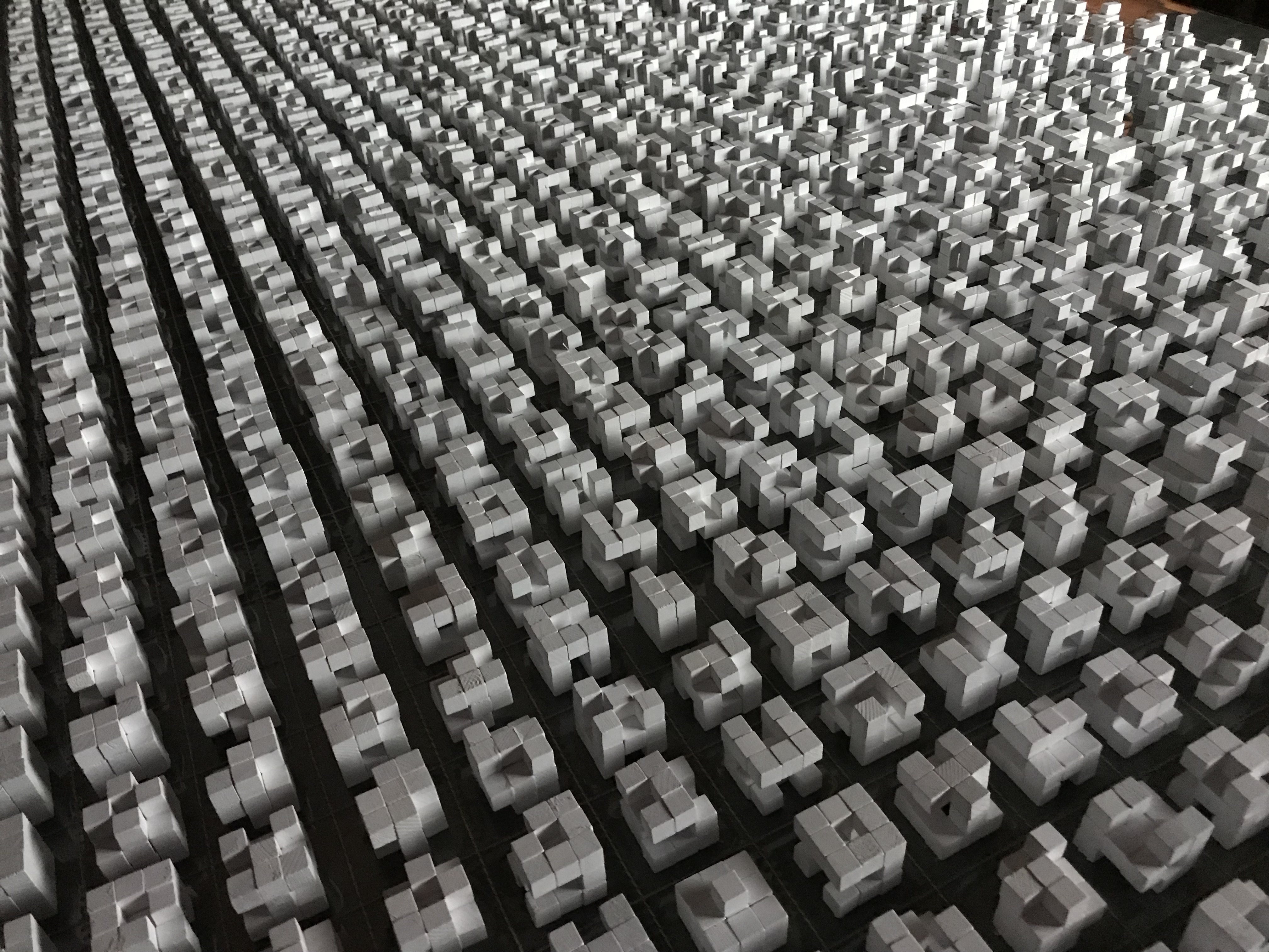 tentoongesteld in het University College van Rotterdam, 2018